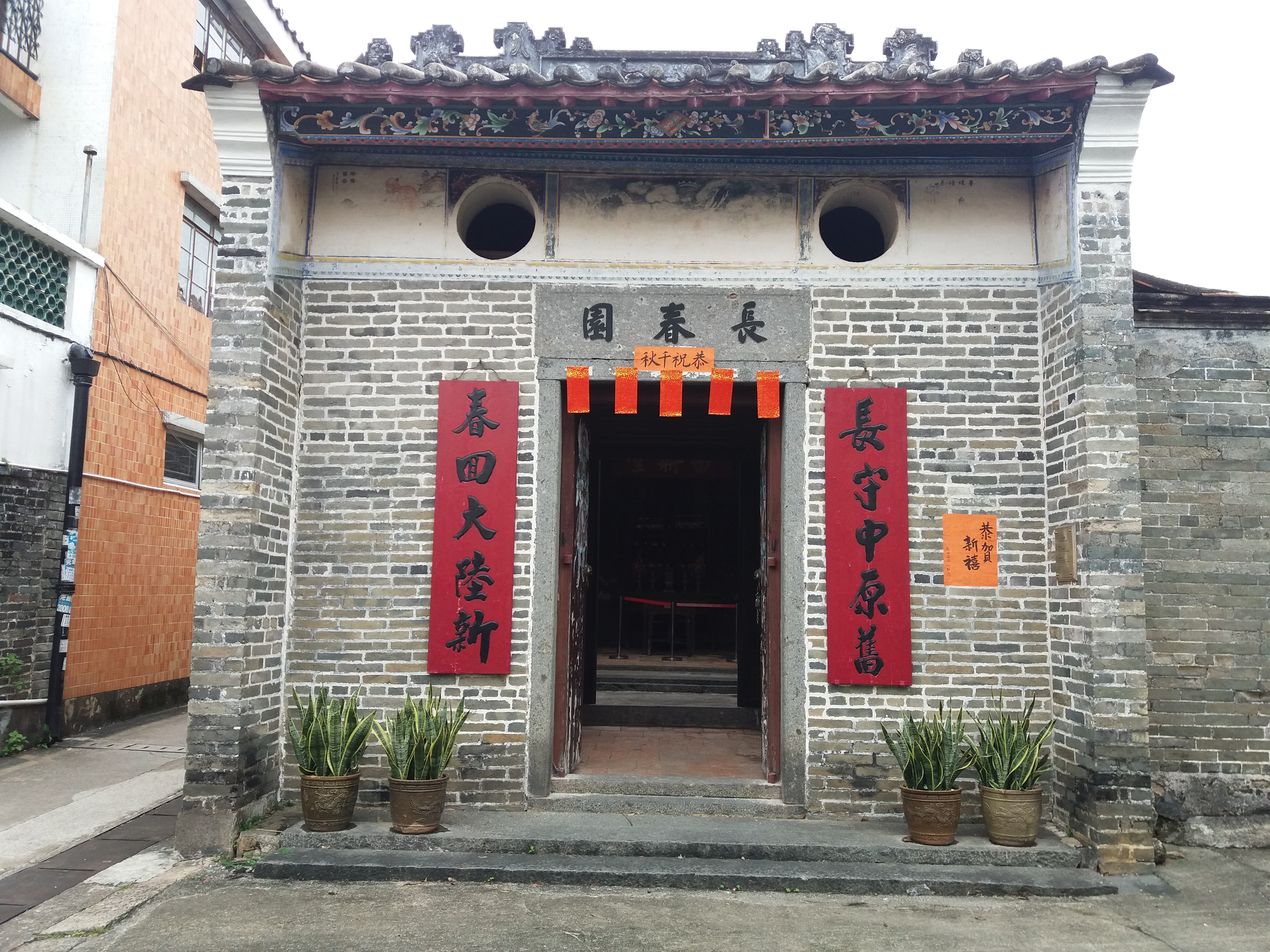 中文（香港）: 錦田長春園